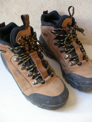 디지털 카메라로 직접 제작